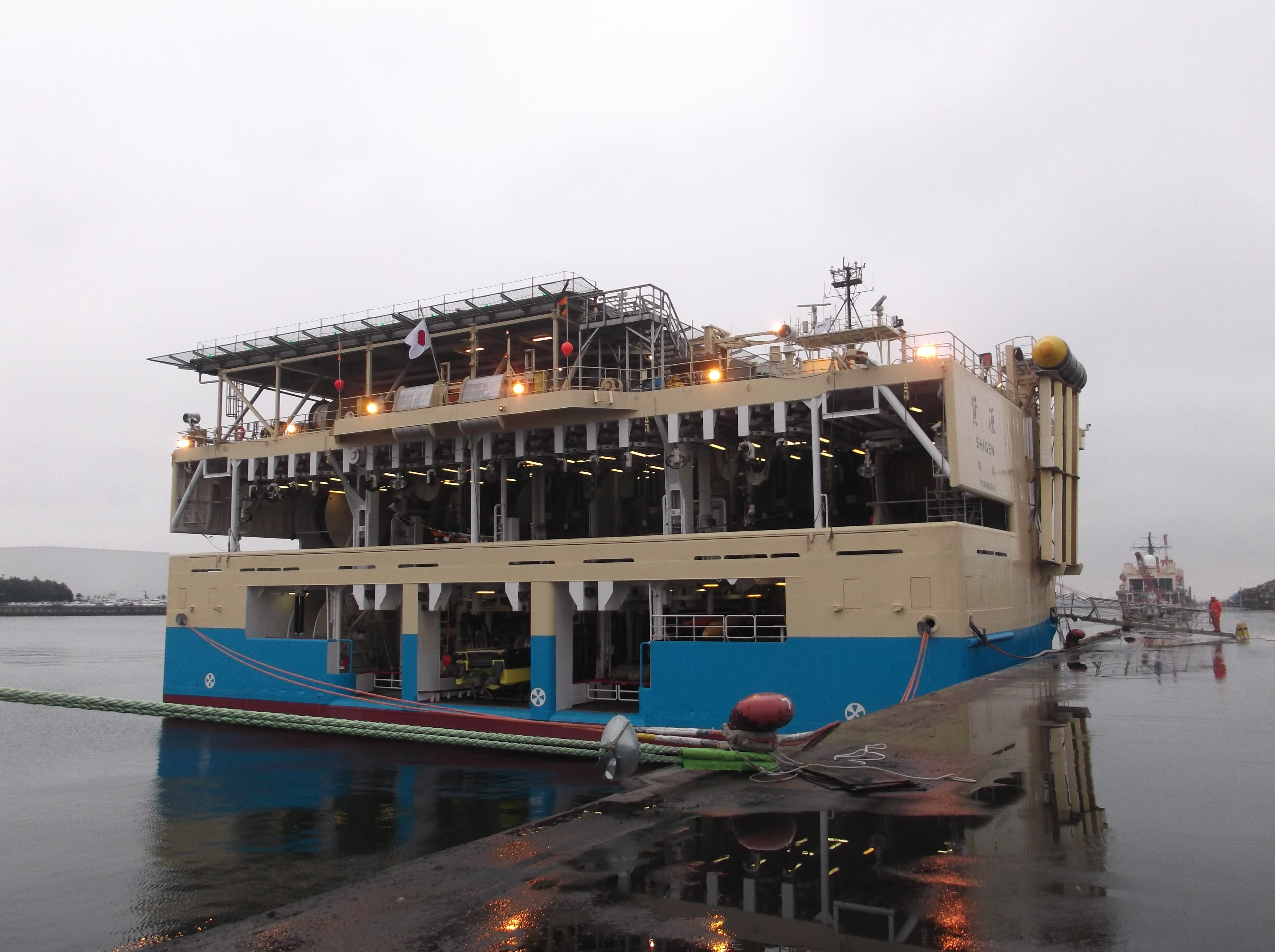 独立行政法人石油夕天然ガス・金属鉱物資源機構の調査船資源（しげん）後方から、千葉県船橋市の船橋港で撮影